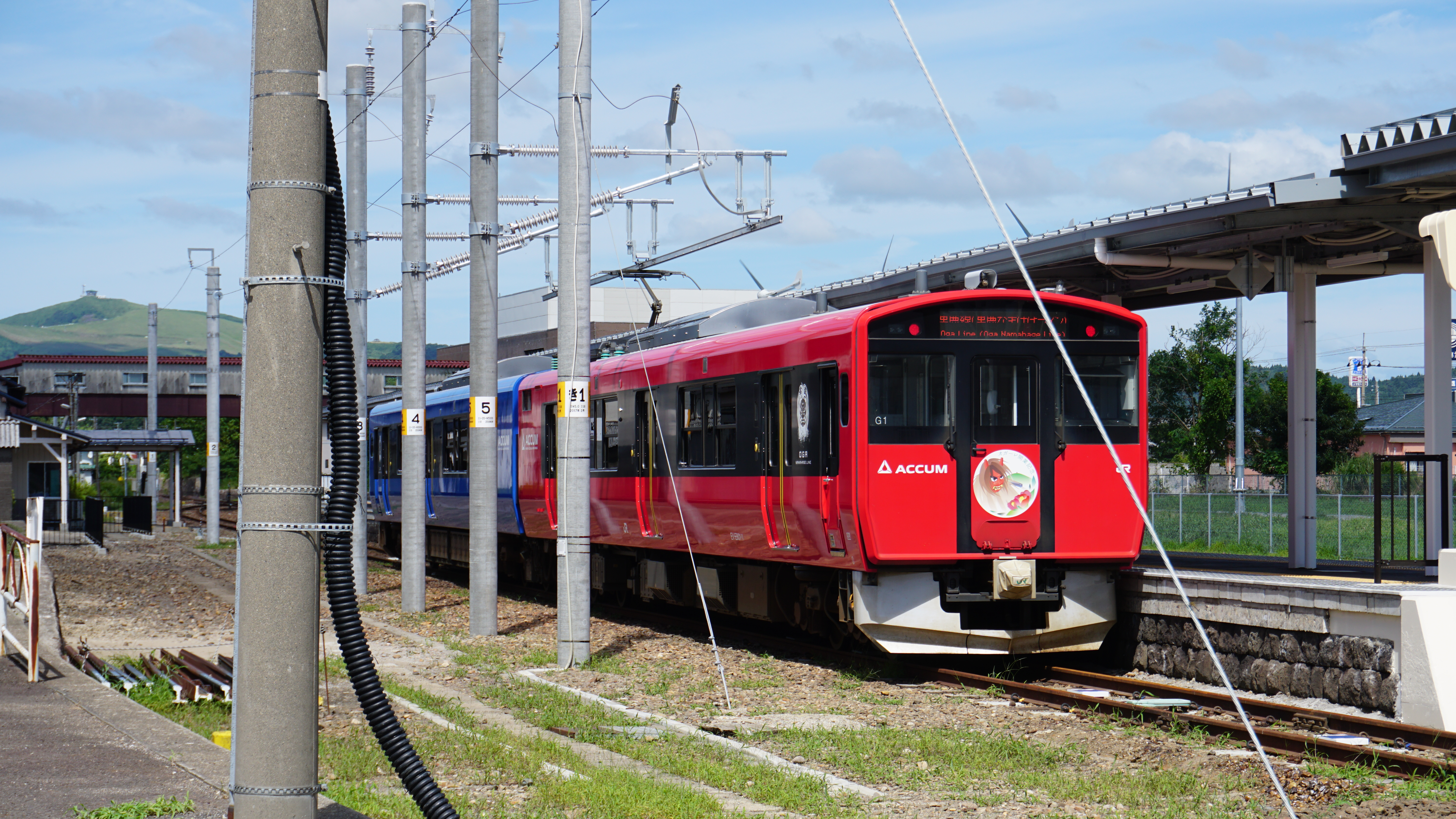 男鹿駅に停車中のEV-E801系。本形式の導入にあたって全線非電化の男鹿線では男鹿駅に給電設備が設けられ、停車中に剛体架線からパンタグラフで受電する。